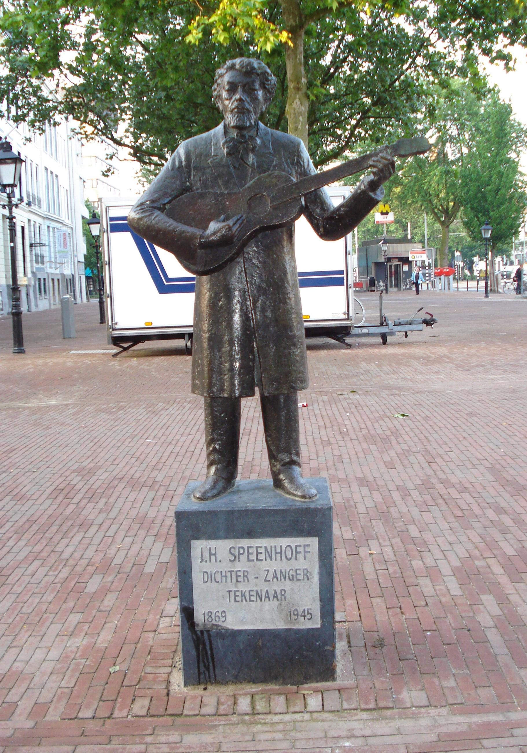 Rotterdam, Oude Binnenweg. Standbeeld Koos Speenhoff door Adri Blok. Rotterdam/The Netherlands